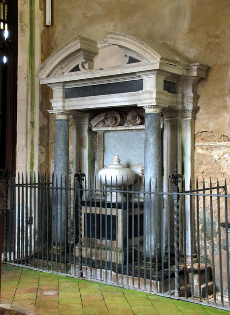 St Margaret, Paston, Norfolk - Tomb